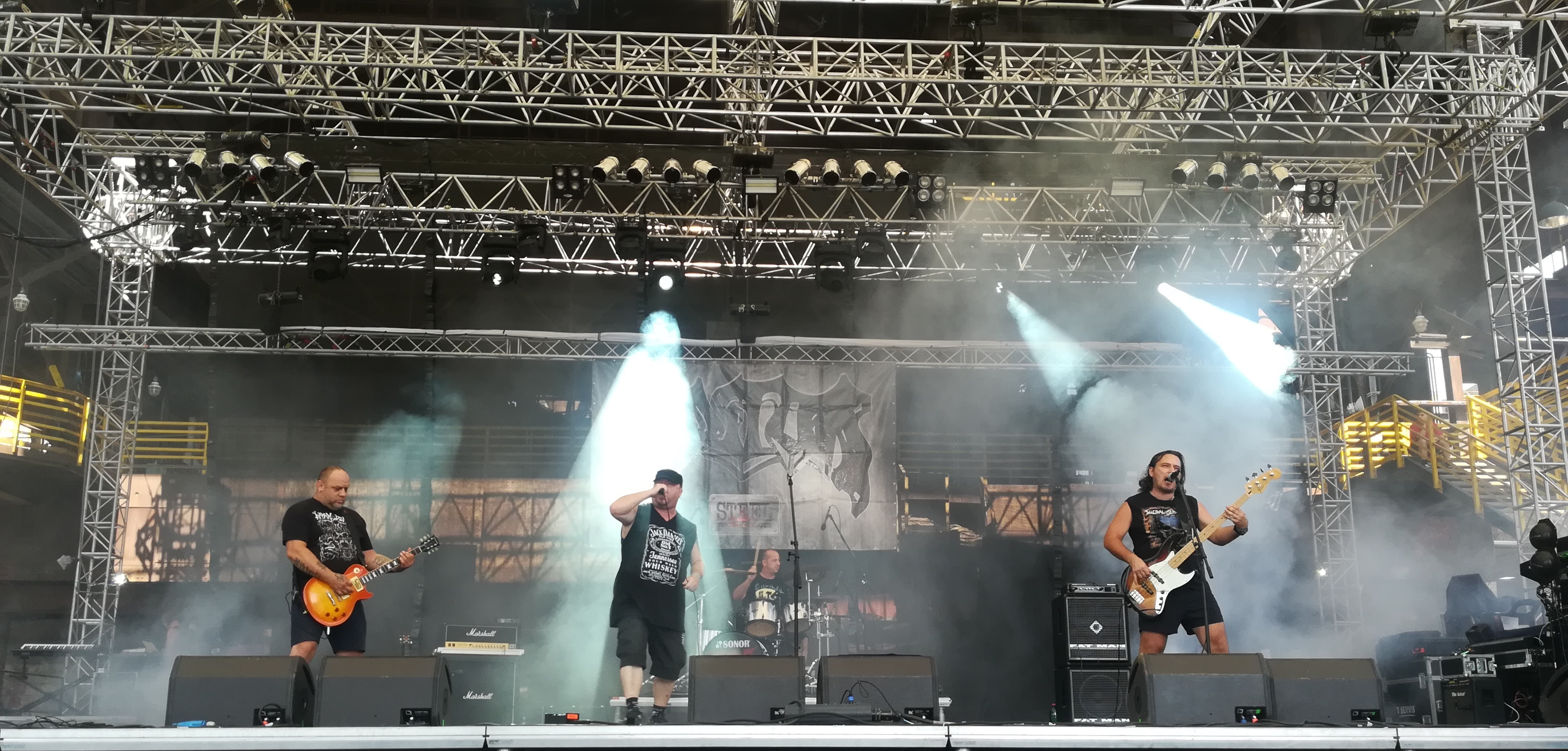 Koncertna fotka skupiny Editor